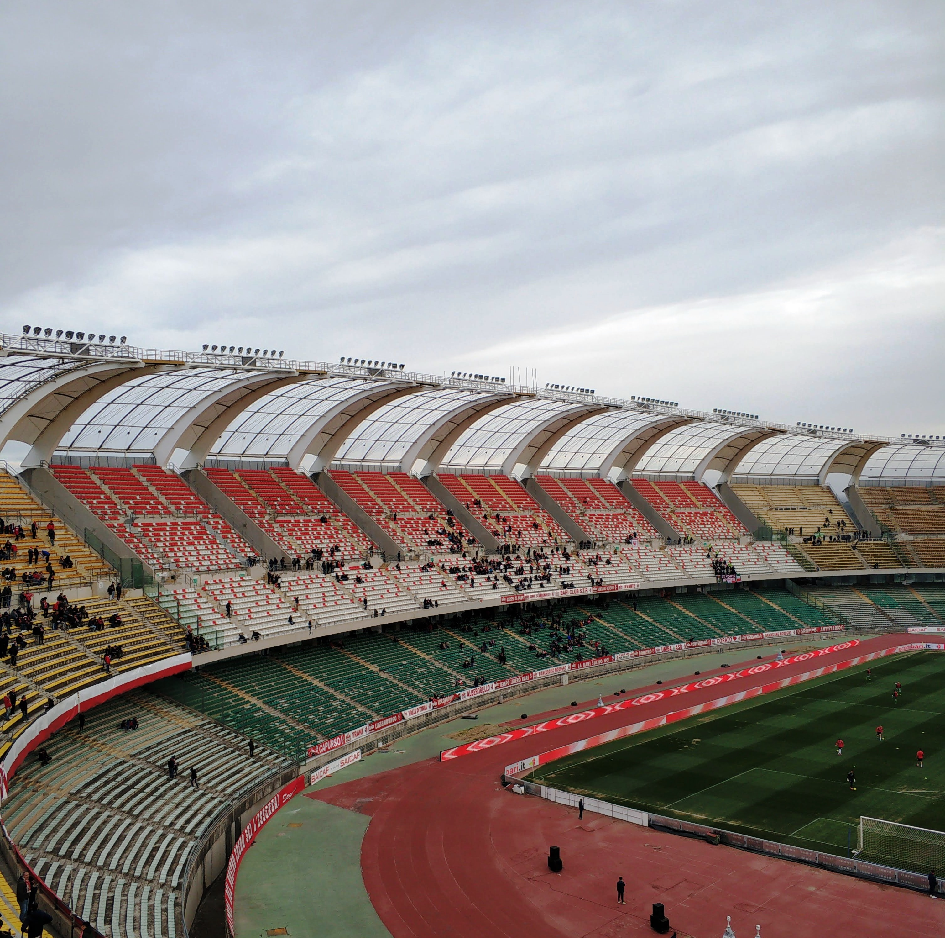 Tribuna Est in fase di installazione dei nuovi seggiolini